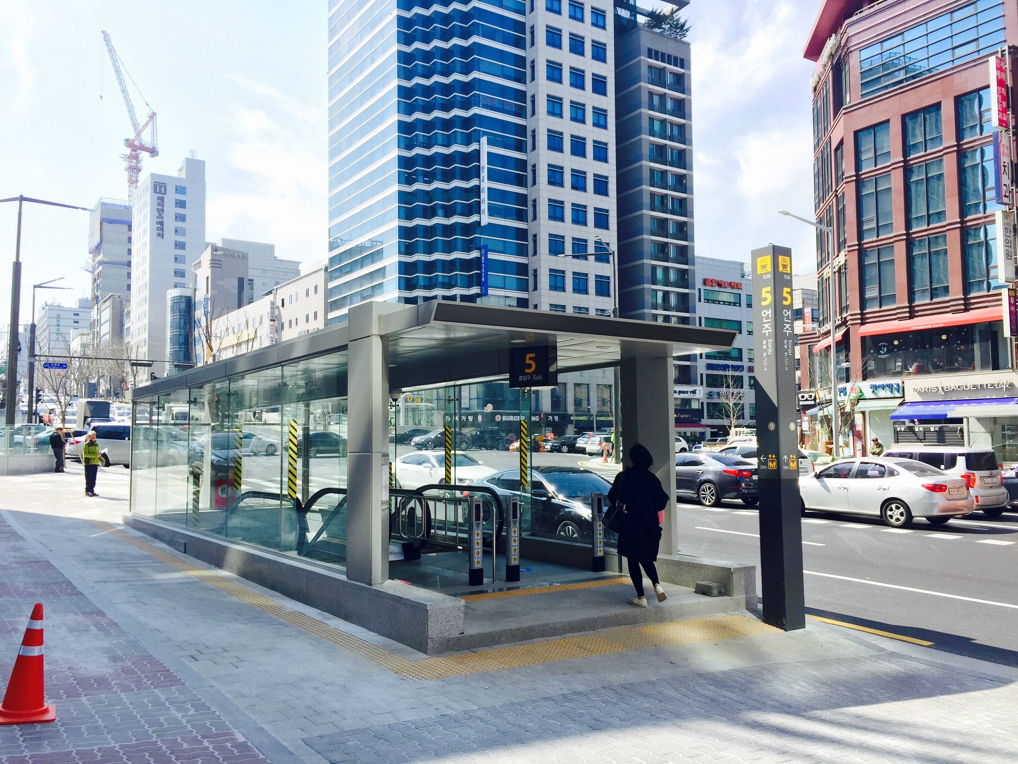 언주역 5번 출입구